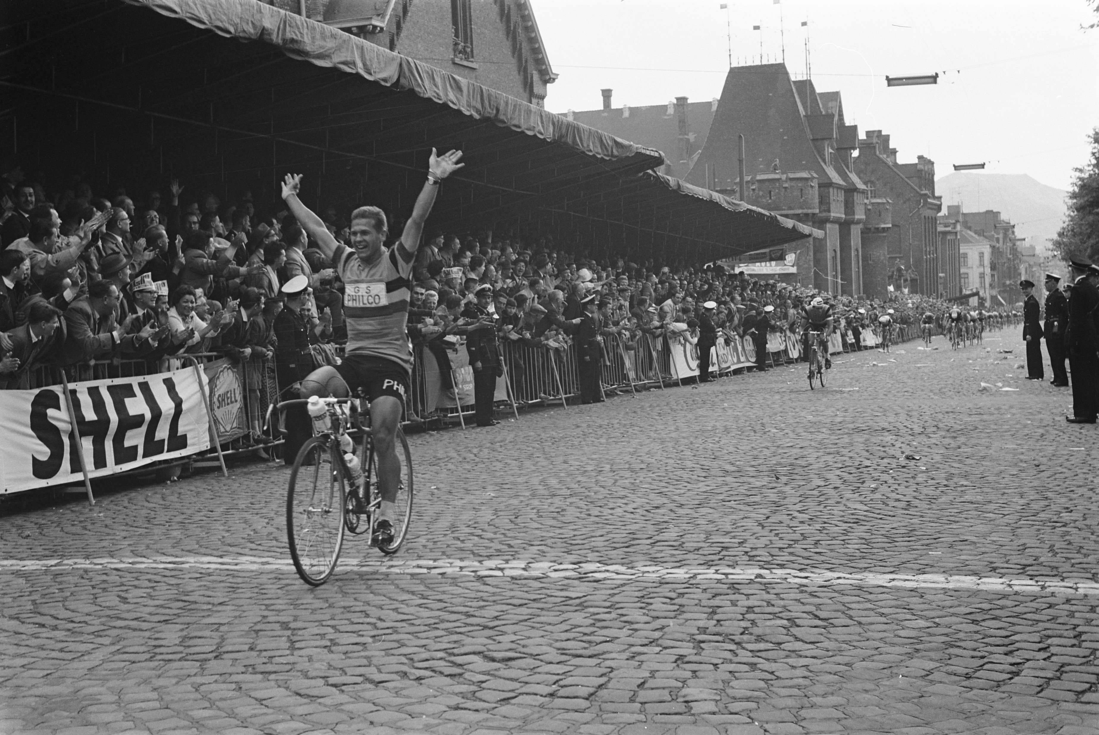 Emil Daems over de finish van de 4e etappe in Charleroi.